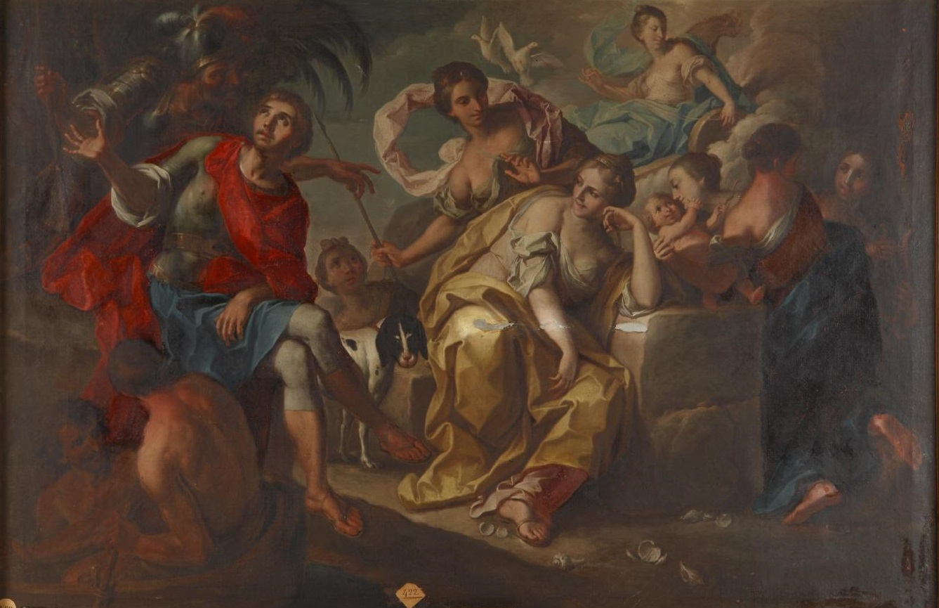 La obra representa a Telémaco, que era hijo del rey Ulises de ítaca, en compañía de Méntor y de la diosa Diana.